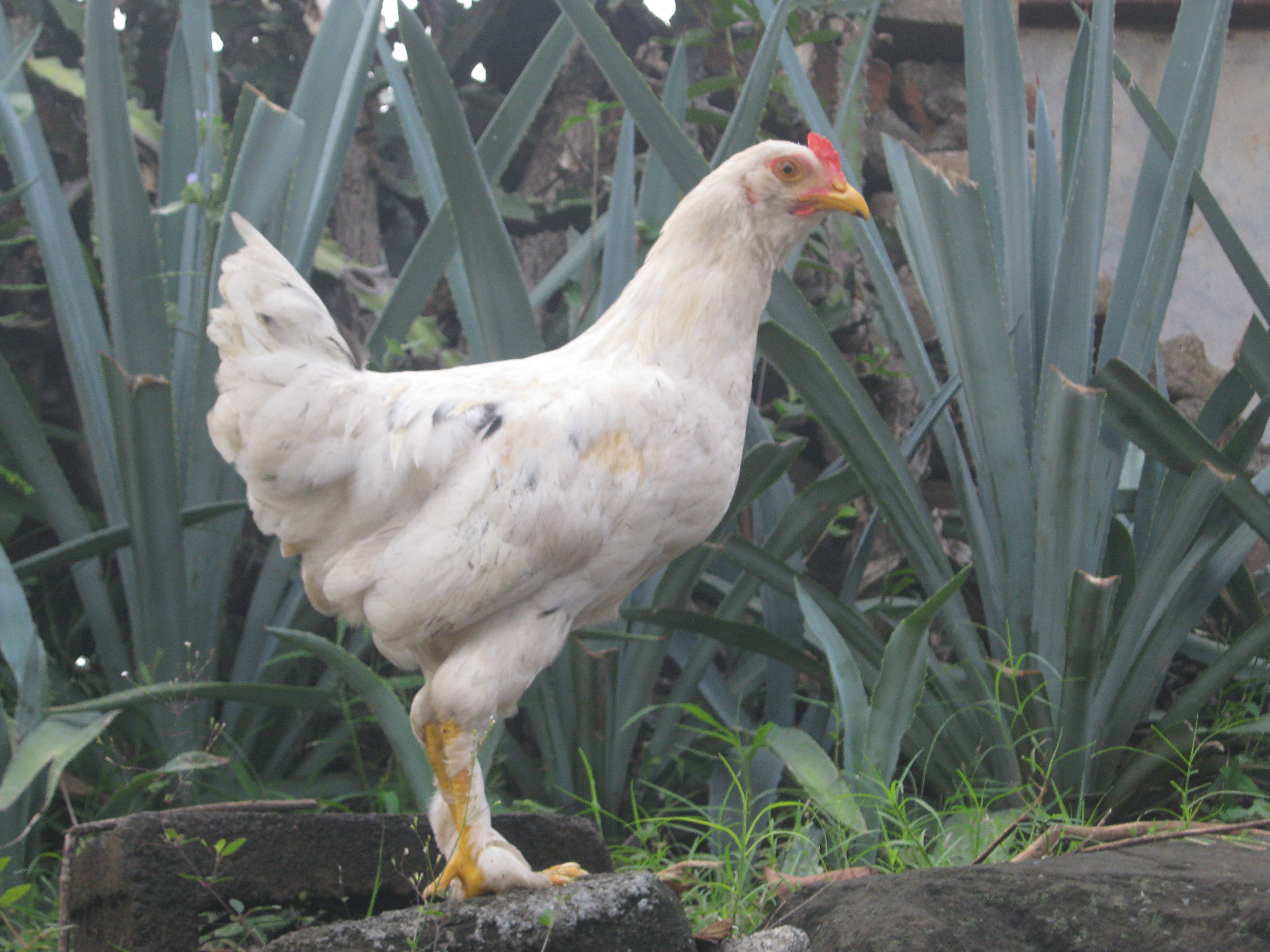 Un gallito precoz.